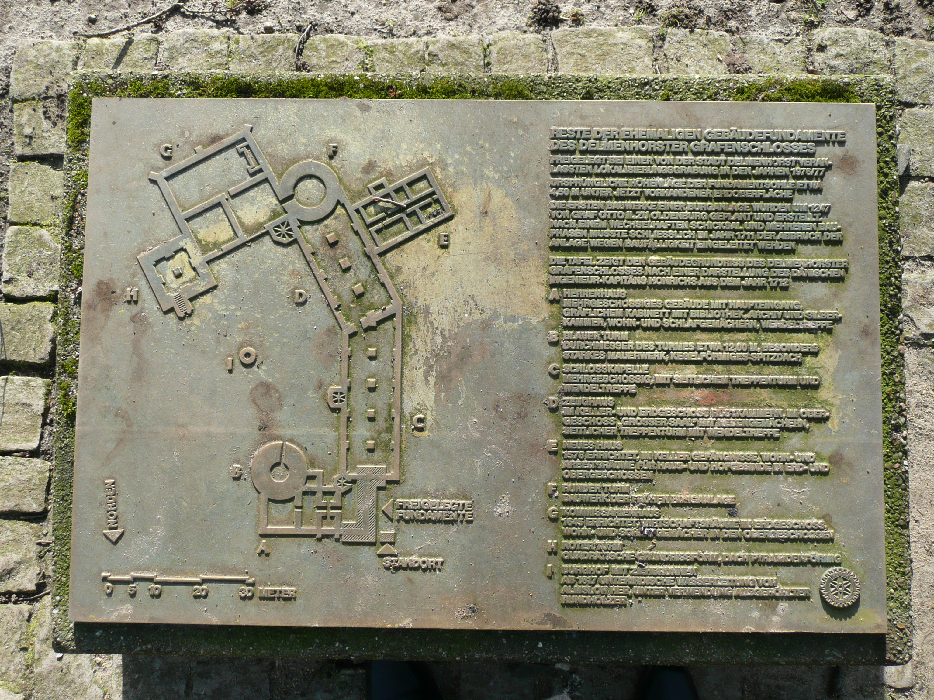 Informationstafel (Grundriss mit Erläuterungen) zu den ehemaligen Gebäudefundamenten des Delmenhorster Grafenschlosses